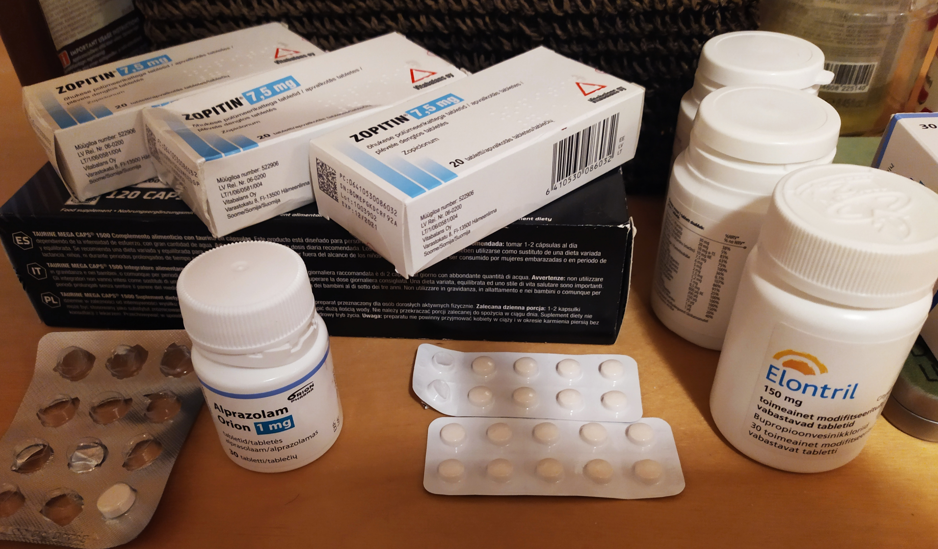 Retseptiravimid